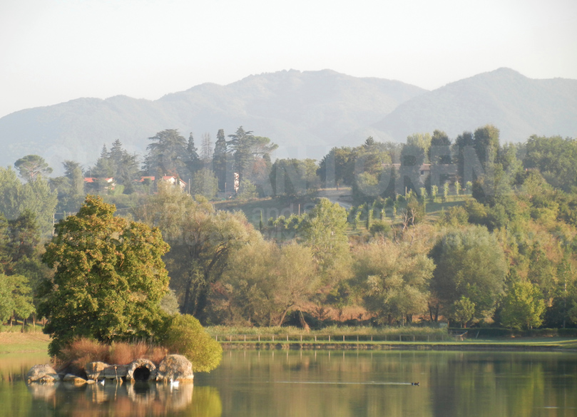 Vista sul Lago di Vicchio. In primo piano il piccolo isolotto sul lago.